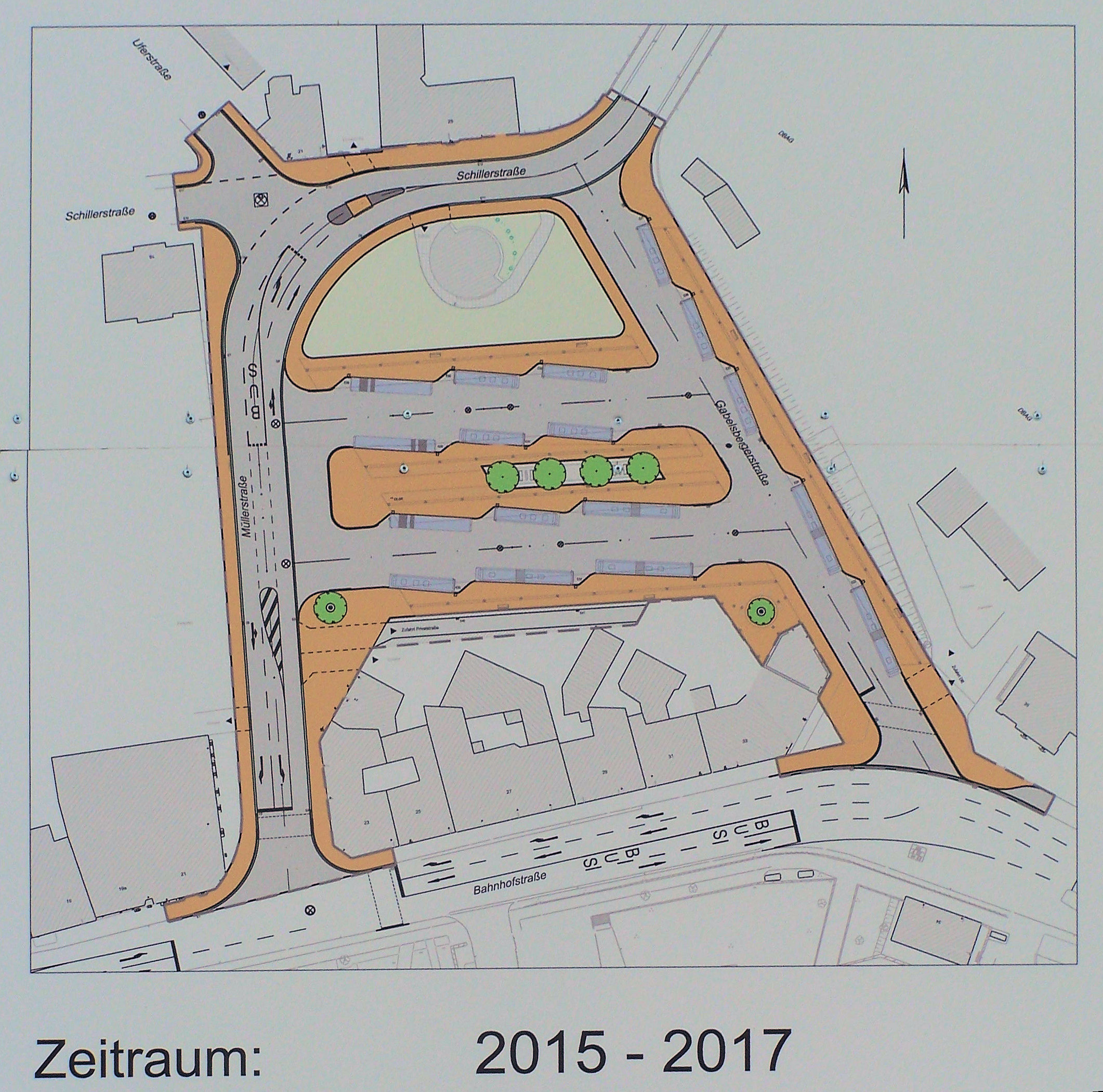 Umbautarbeiten am Busbahnhof der Stadt Eisenach in der Gabelsberger- und Müllerstraße. Stand Mai 2016. Infotafel zum Projekt.